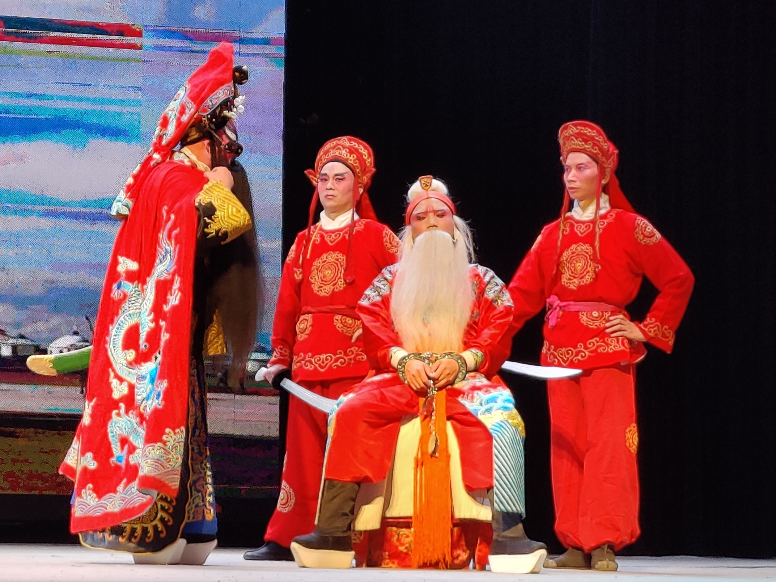 中文（中国大陆）: 韩玄要斩黄忠，魏延说要向元帅求情。